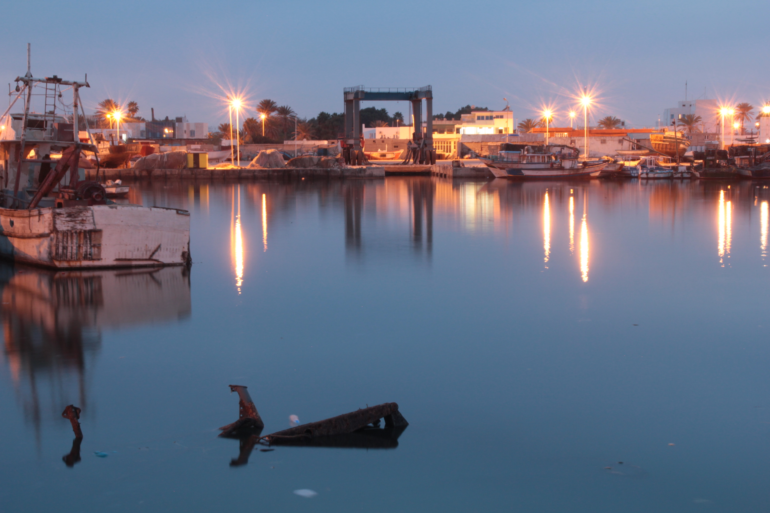 ميناء الصيد البحري - قابس